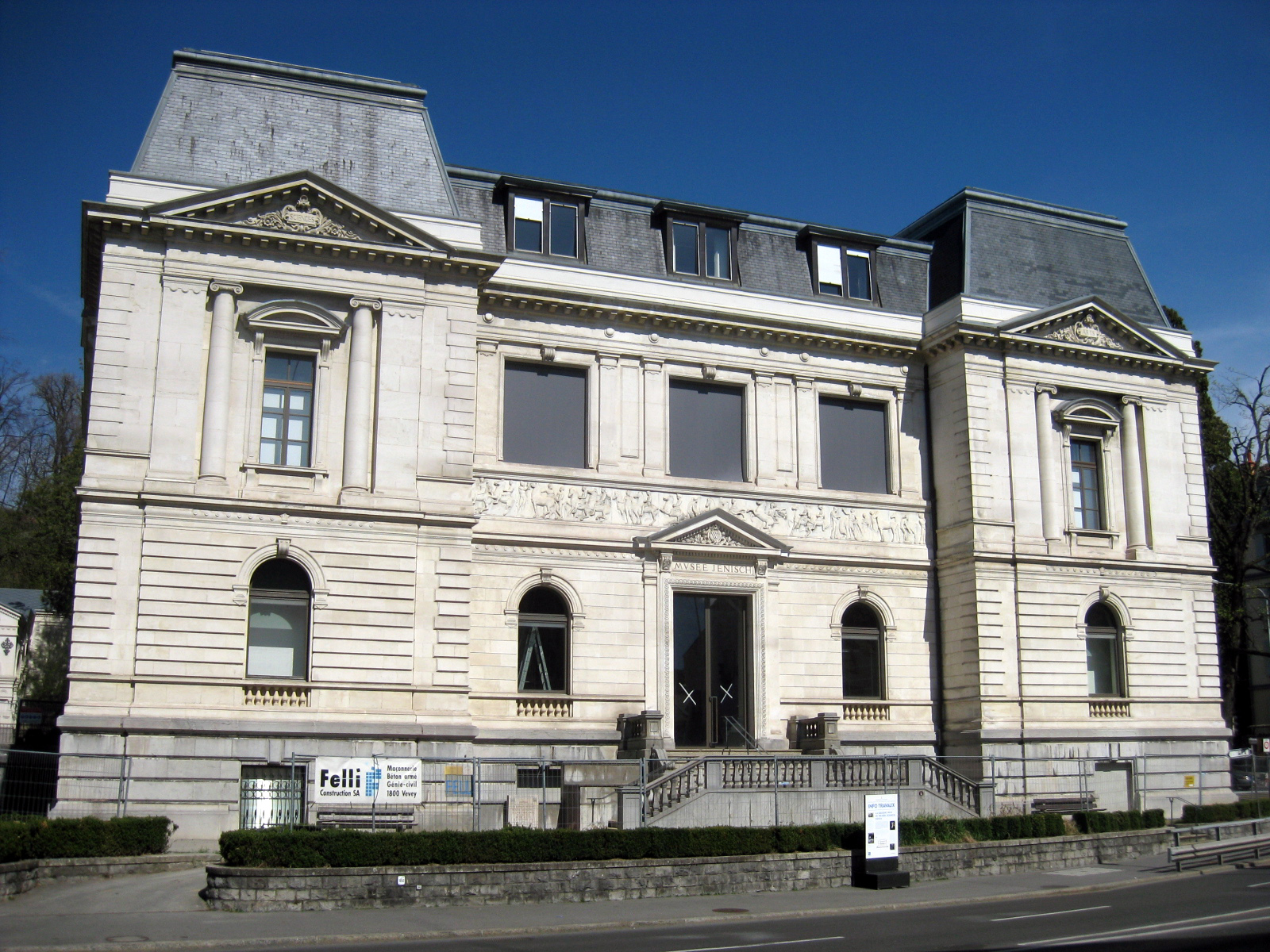 瑞士沃韦耶尼施美术馆